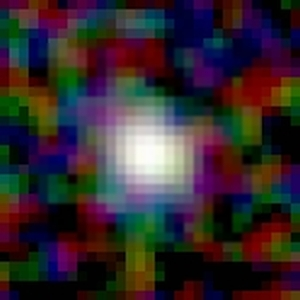 Galaxy NGC 67